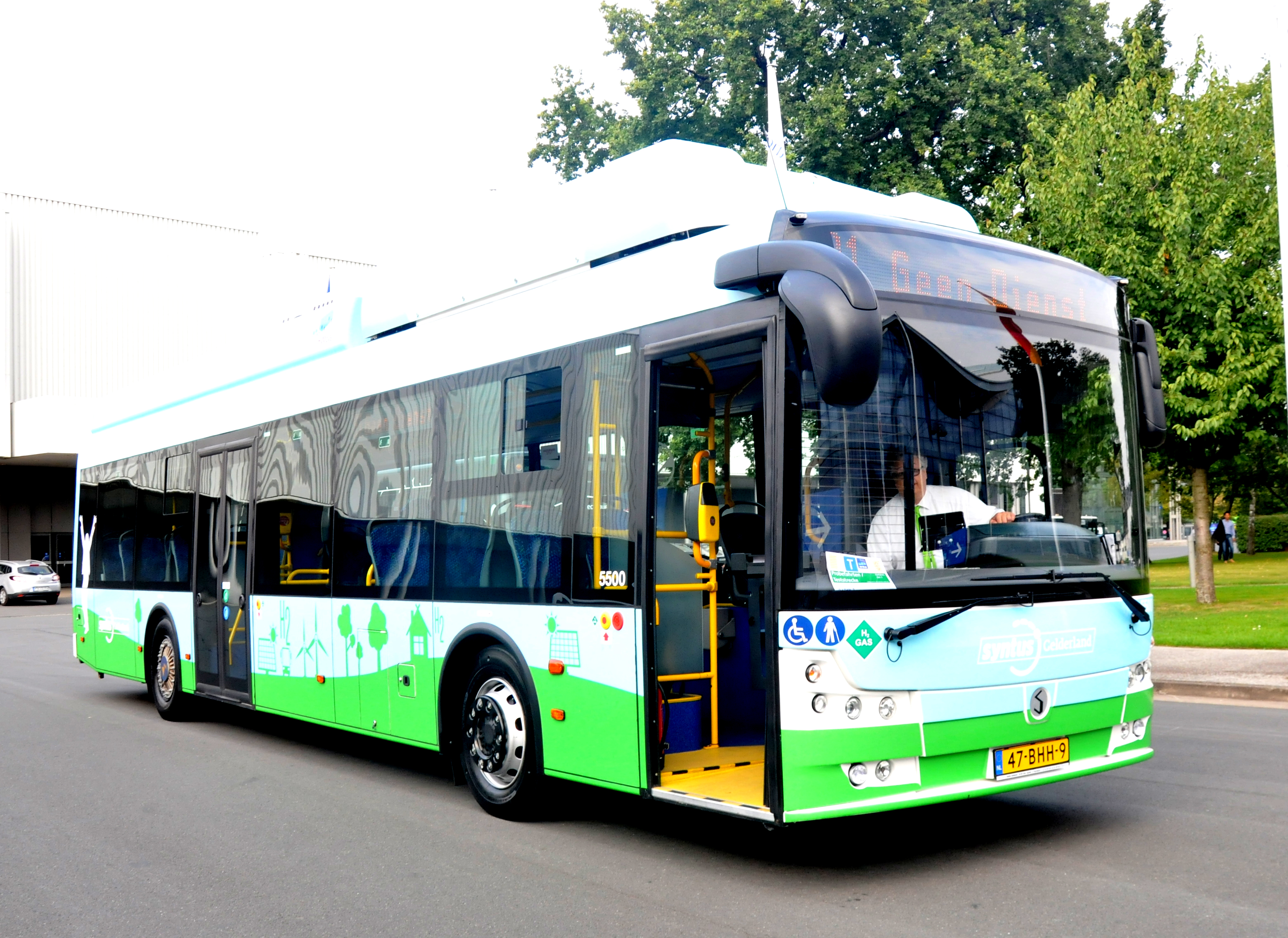 Solbus Solcity SM12 bus als Syntus 5500 van HyMove bij Internationale Automobil-Ausstellung (IAA) 2016 te Hannover. Deze bus was ook in 2018 op de IAA te Hannover aanwezig.